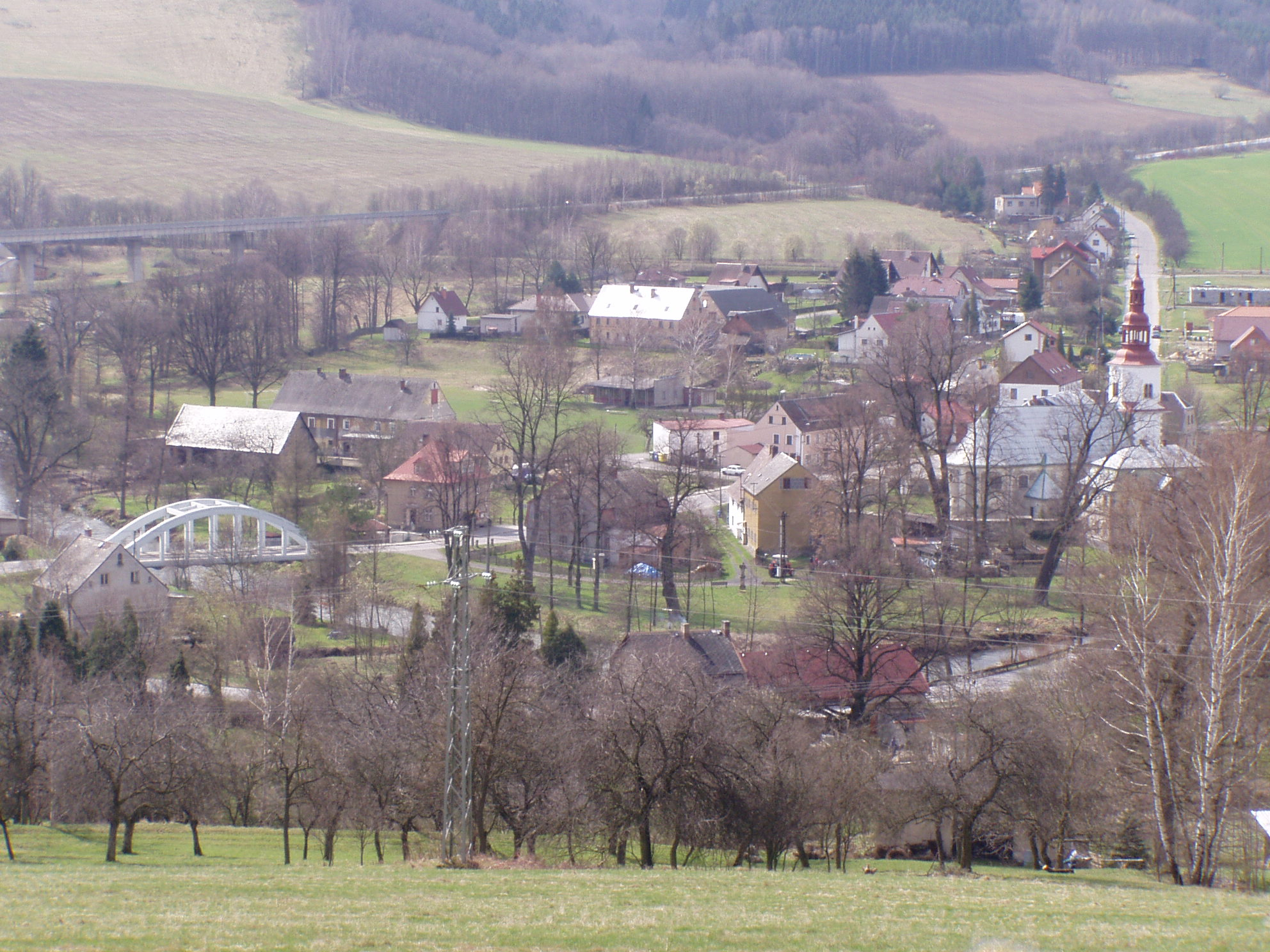 Obec Bílý Kostel nad Nisou při pohledu z Ulrichova kopce